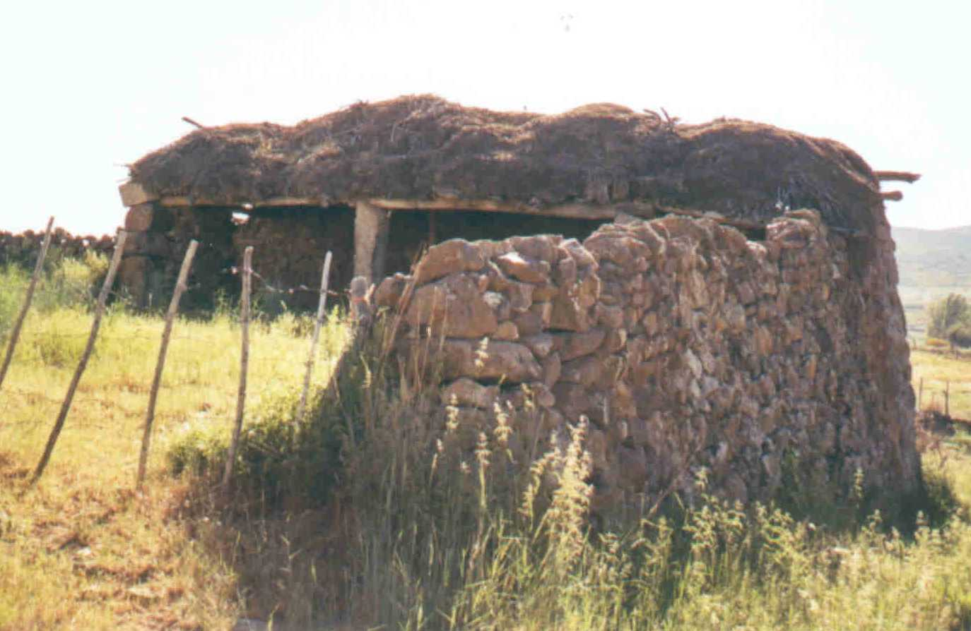 TINAO EN SAN MARTIN DE LA VEGA DEL ALBERCHE (AVILA, ESPAÑA)